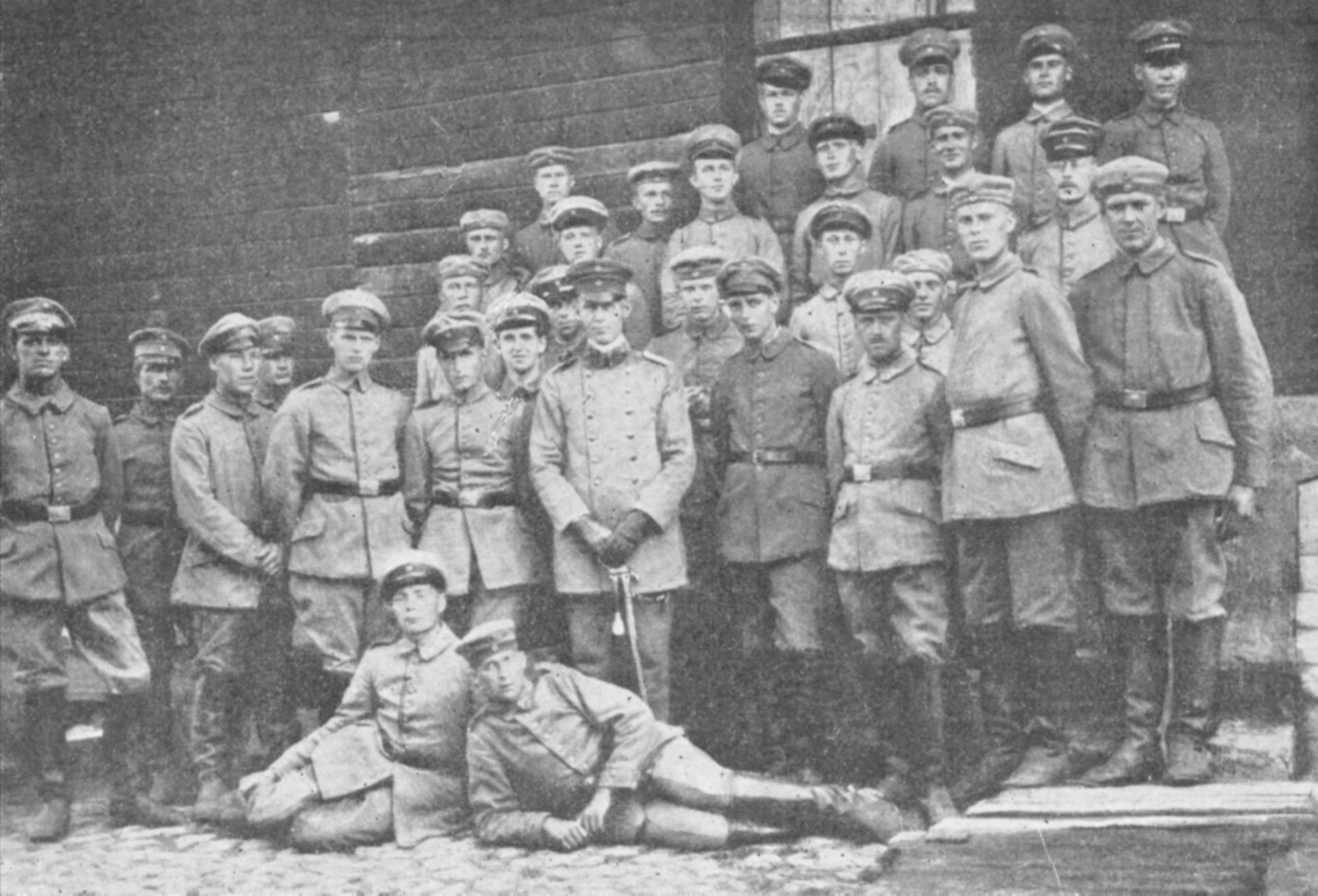 Description